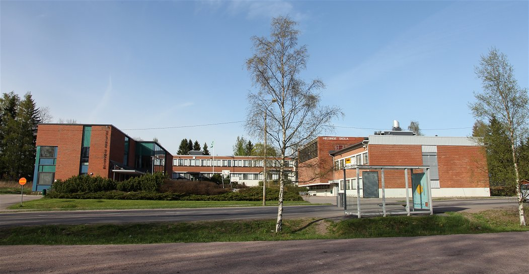 Helsinge skola on Vantaan Tikkurilan suuralueen Helsingin pitäjän kirkonkylässä toimiva ruotsinkielinen yläkoulu. Saman koulurakennuksen länsiosassa (kuvassa vasemmalla) toimii Helsinge gymnasium, ruotsinkielinen lukio.